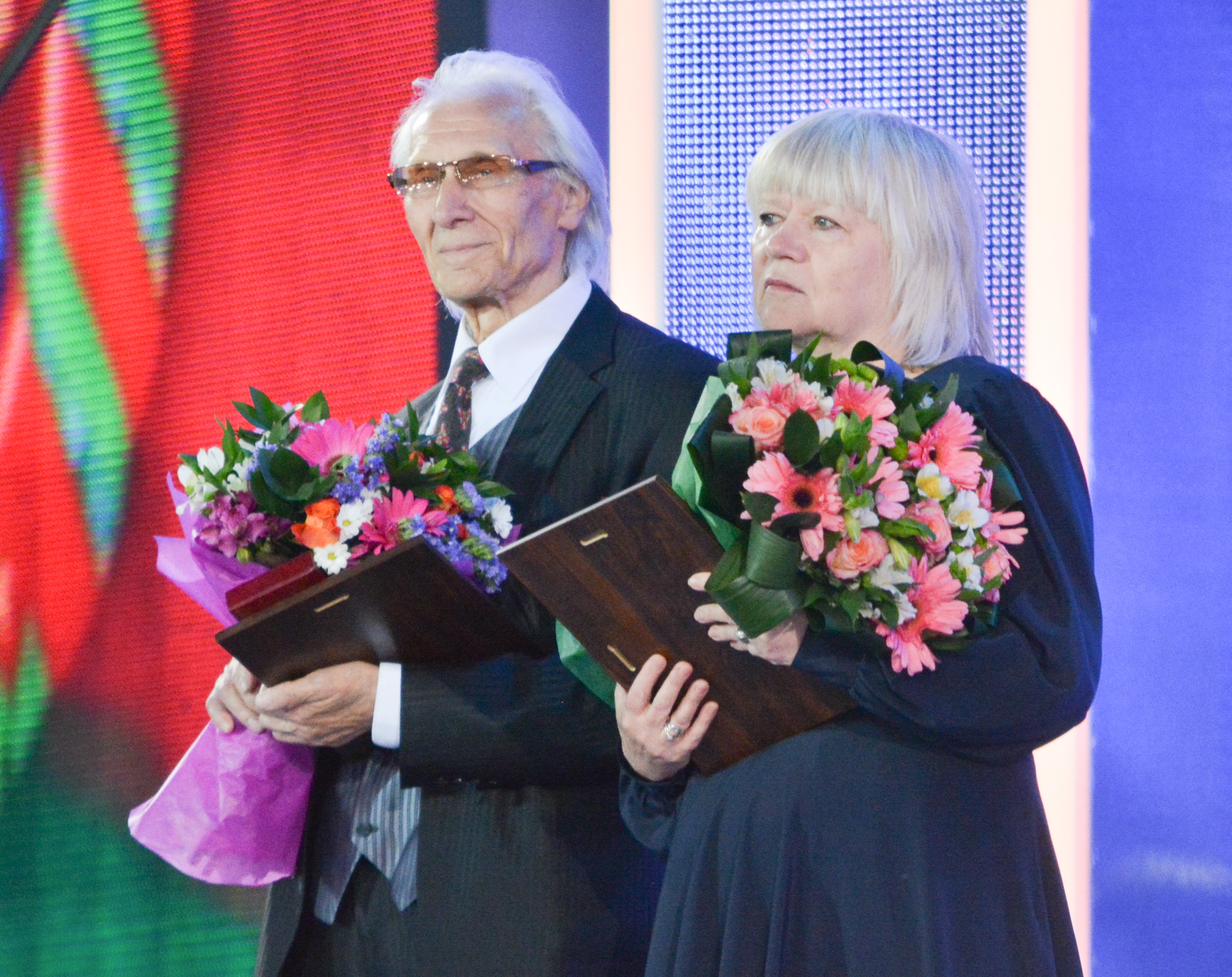 Иван Миско и Инесса Слюнькова. Открытие фестиваля «Славянский Базар в Витебске» 2014.